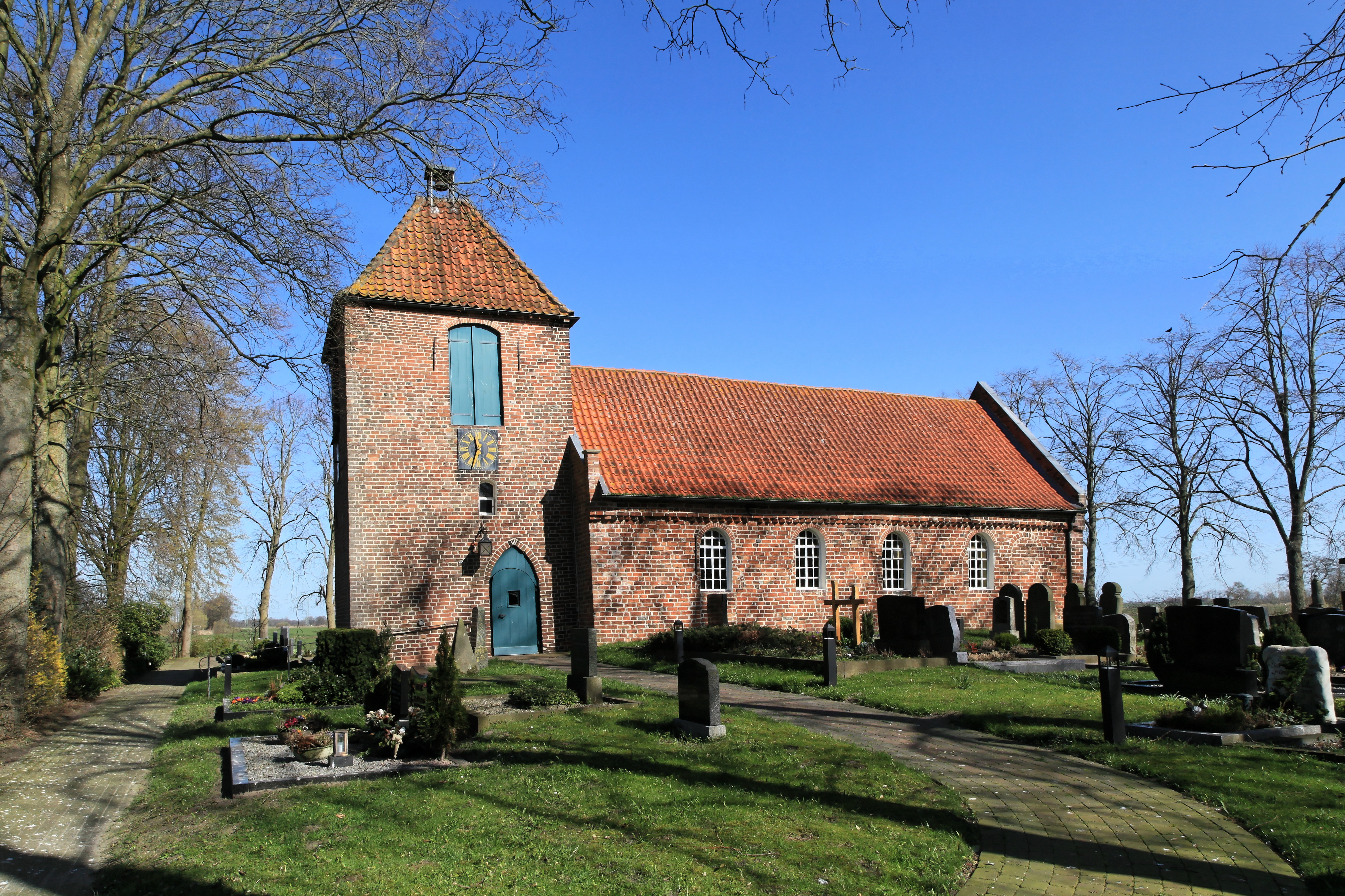 Vellager Friedhof und Vellager Kirche, Villdobben in Vellage, Weener